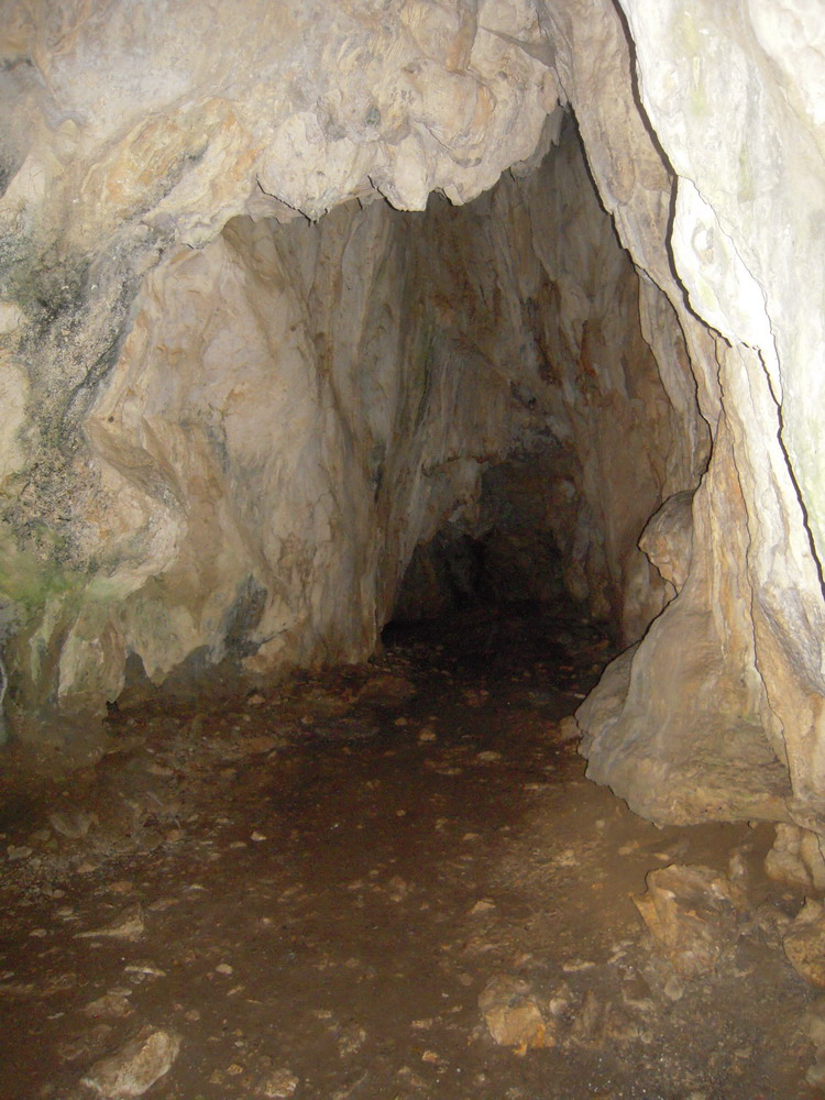 Стрикина_пећина_(Крупа_на_Врбасу)